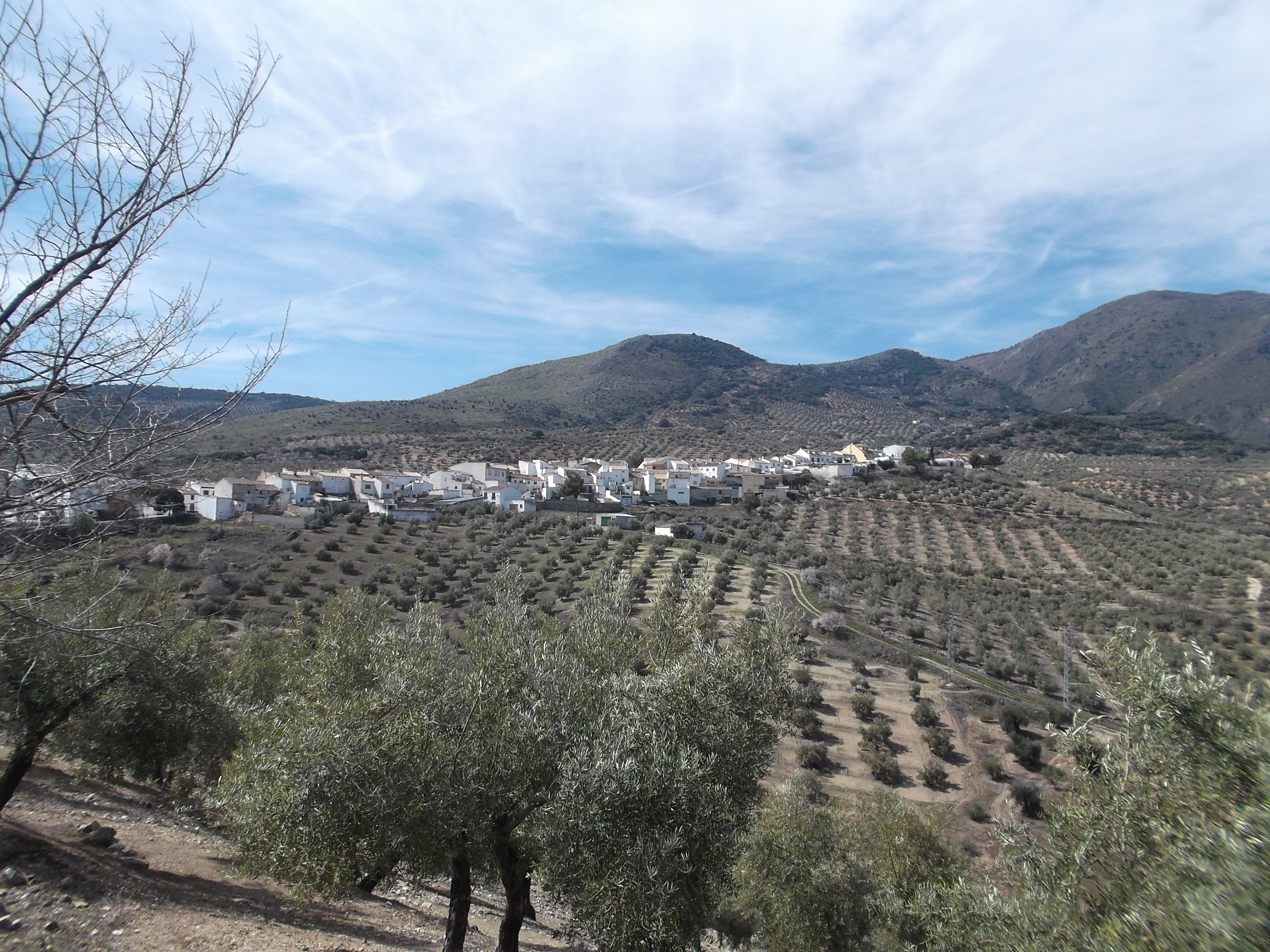 Cárchel